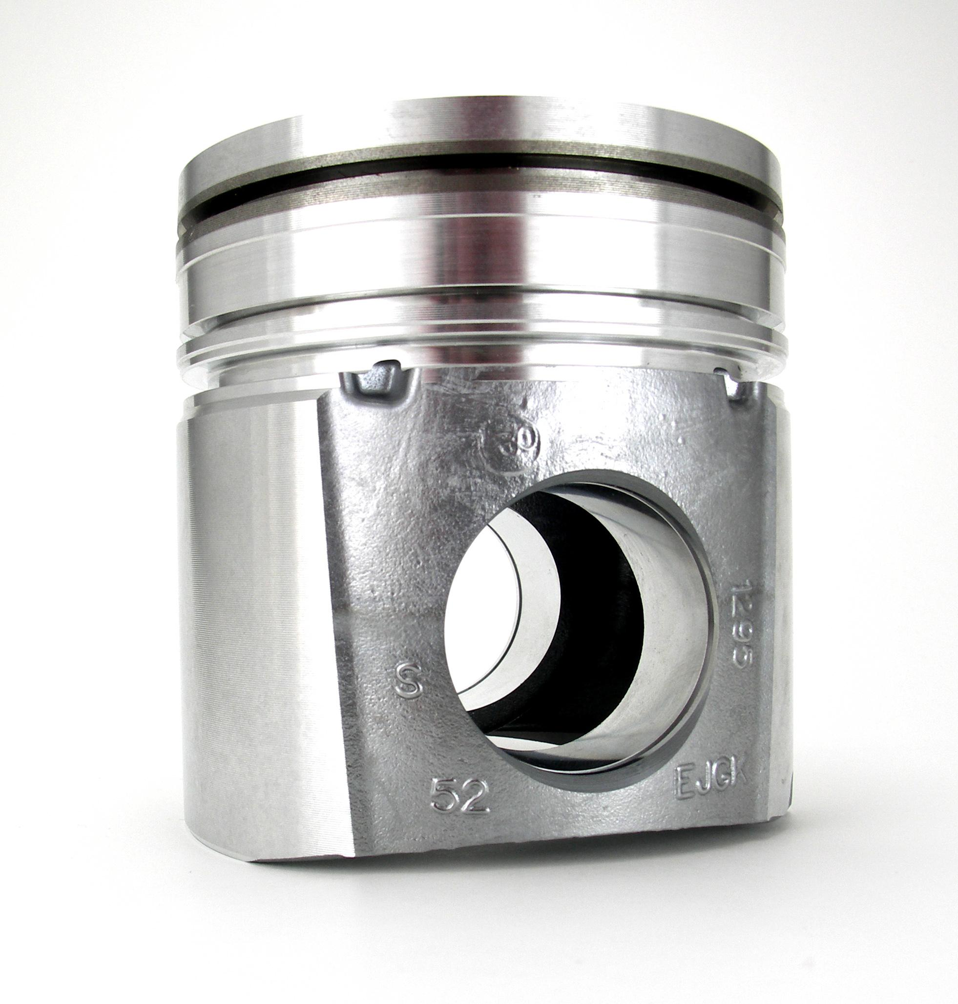 Piston